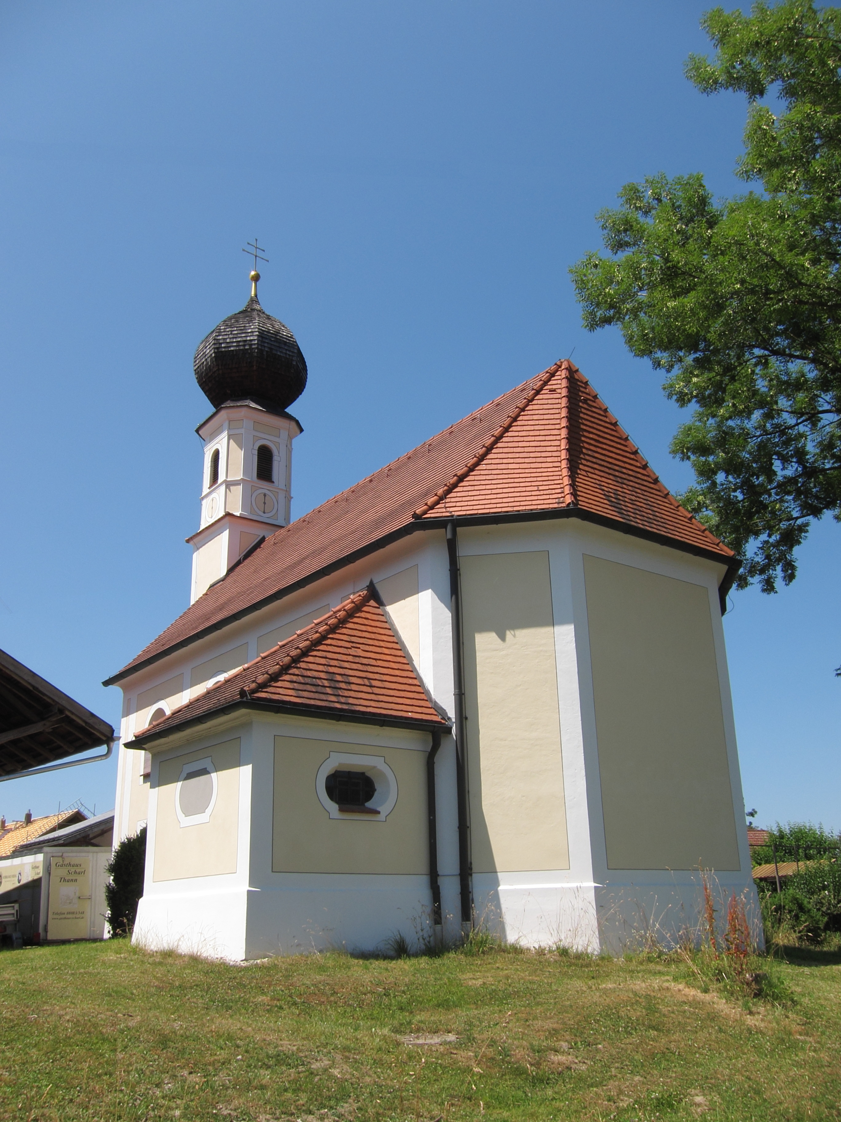 Thann 21; katholische Filialkirche St. Nikolaus, kleiner Barockbau mit angefügter Sakristei und Westturm mit Zwiebelhaube, 1746 verändert.